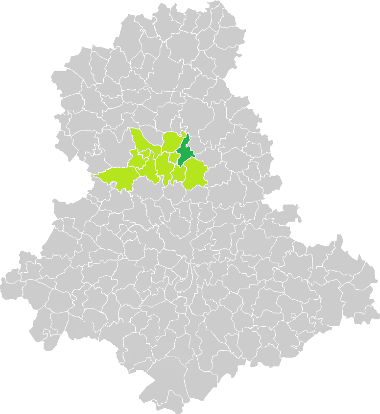 Carte de situation de la commune de Saint-Symphorien-sur-Couze (en vert foncé) dans le votre Canton (en vert clair) sur une carte des communes de la Haute-Vienne